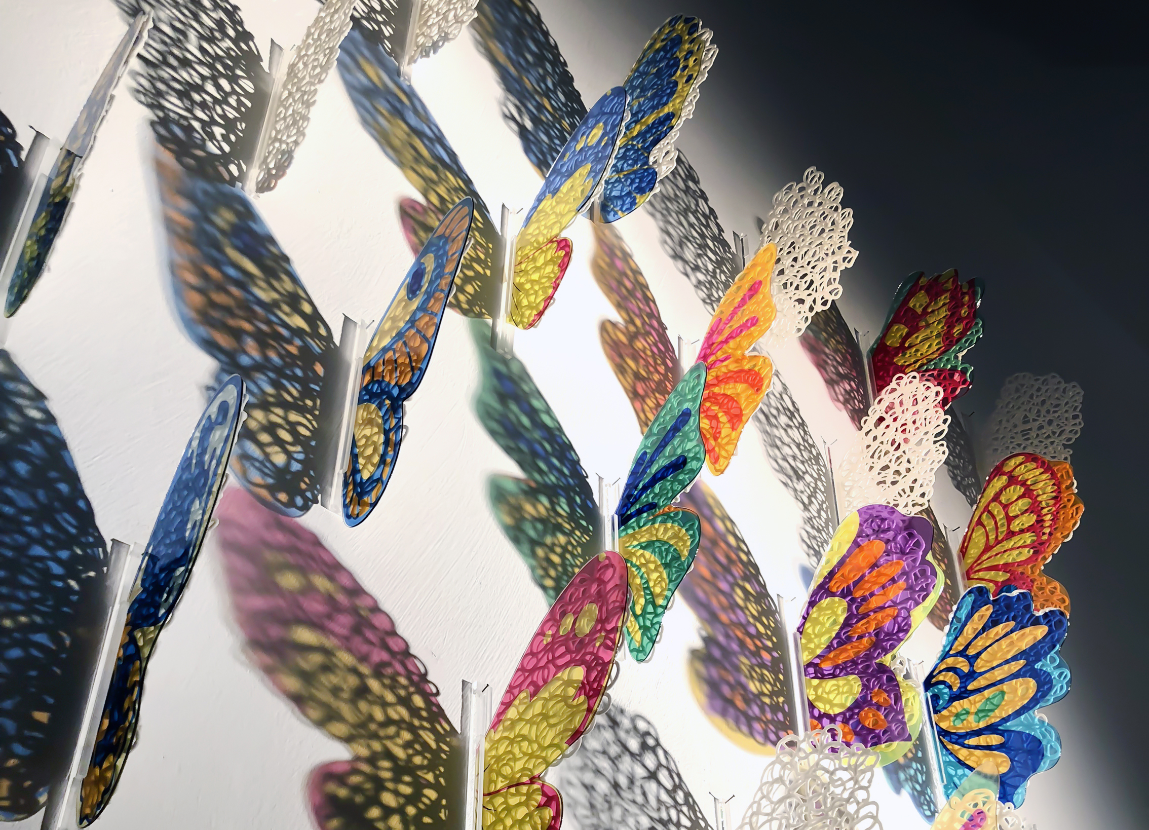 Farfalle è un'opera in ceramica e installazione luminosa dell'artista italiana Antonella Cimatti (2018).